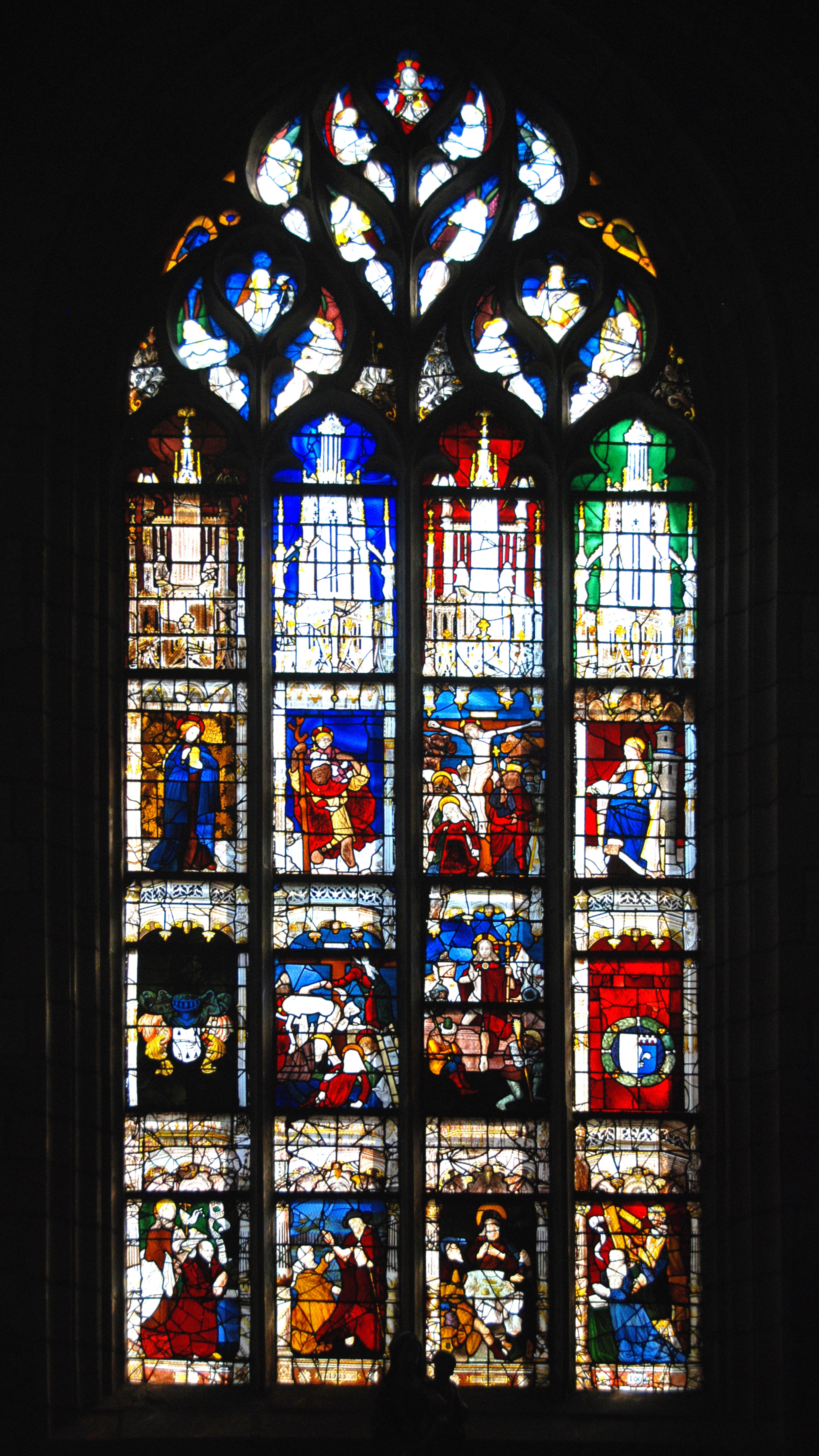 Verrière de la Passion restaurée par Jacques Bony